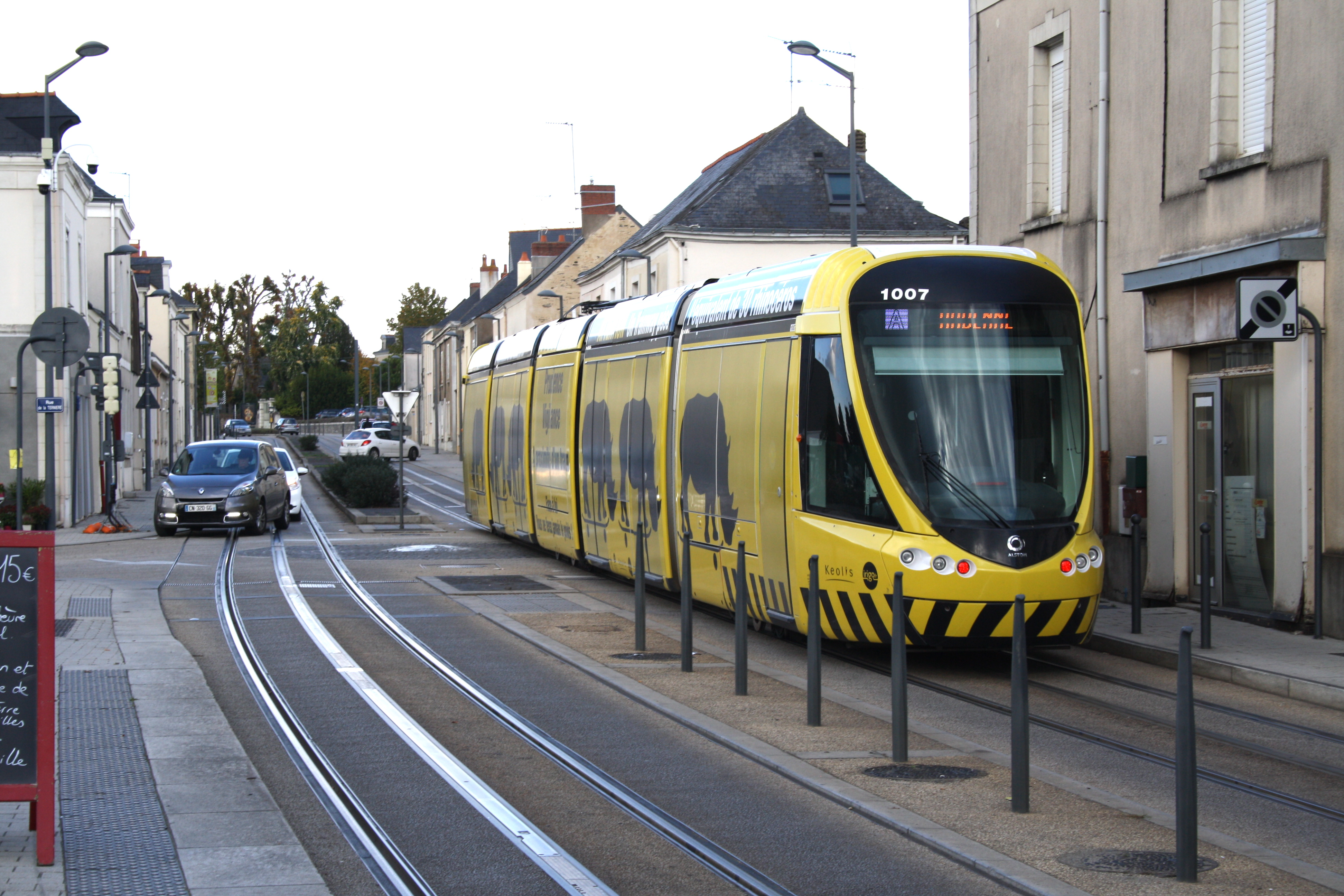 Rame de tramway à Avrillé